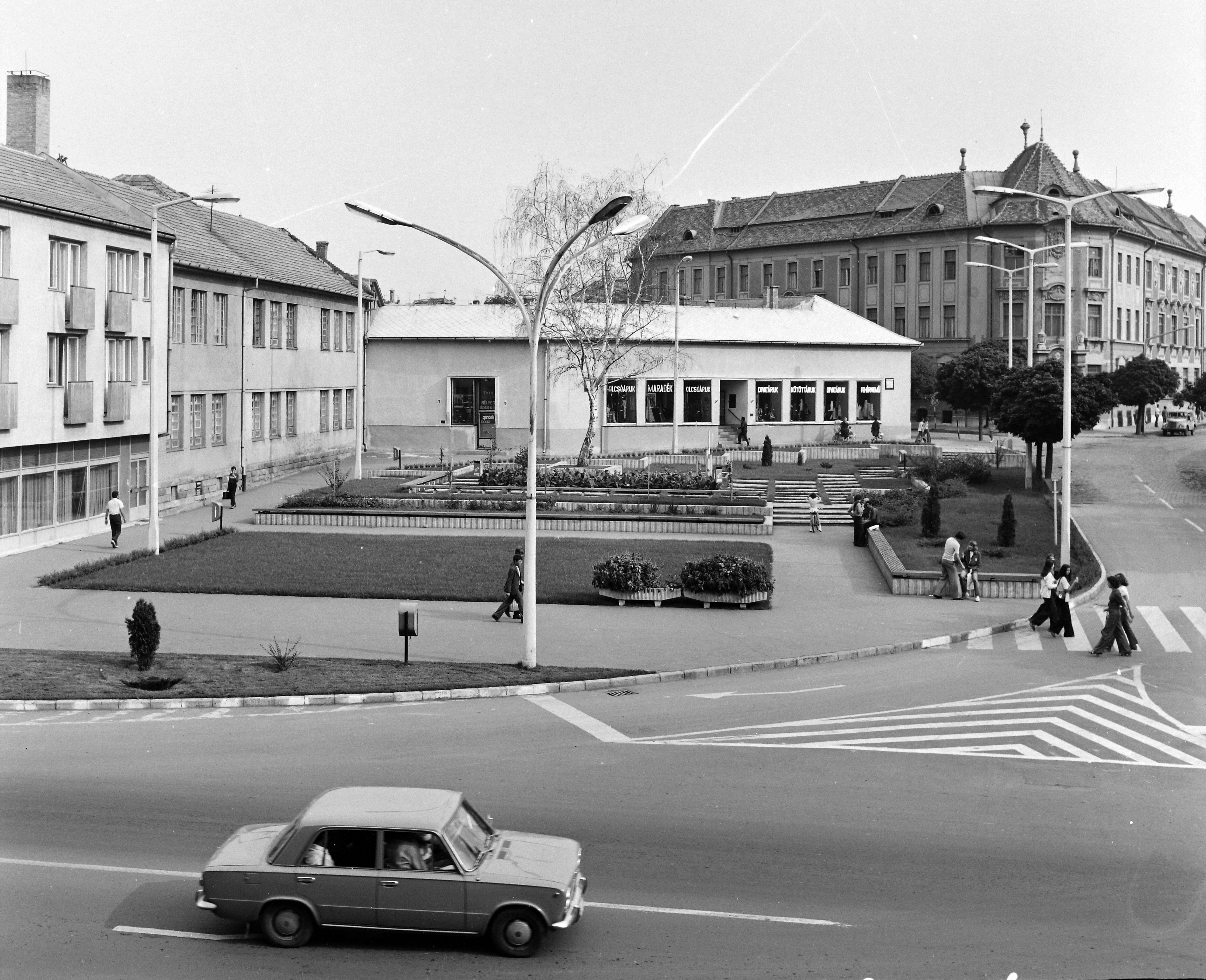 Civitas Fortissima (Köztársaság) tér, jobbra a Bajcsy-Zsilinszky utca és a Balassagyarmati Rendőrkapitányság (eredetileg Pénzügyi palota). A felvétel az egykori Vármegyházból készült. Location: Hungary, Balassagyarmat Title: Civitas Fortissima (Köztársaság) tér, jobbra a Bajcsy-Zsilinszky utca és a Balassagyarmati Rendőrkapitányság (eredetileg Pénzügyi palota). A felvétel az egykori Vármegyházból készült.